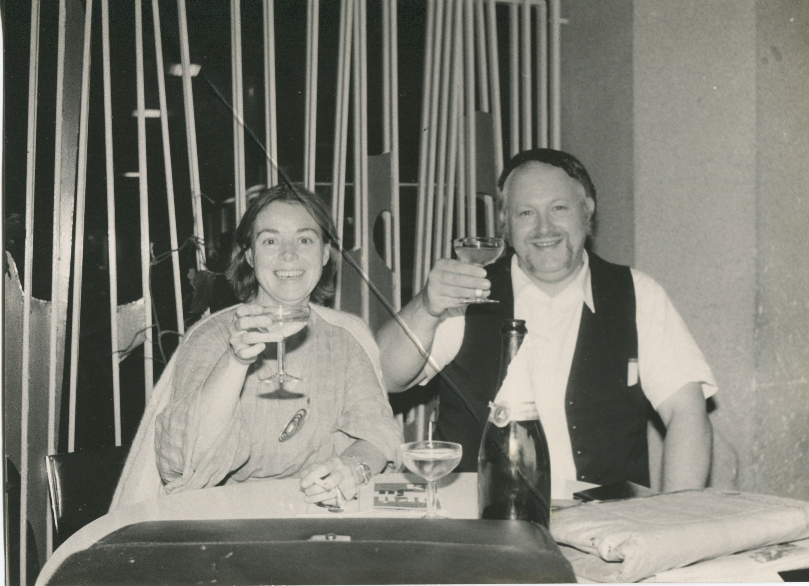 Maria Lluïsa Borràs y Wolf Vostell brindando en 1970